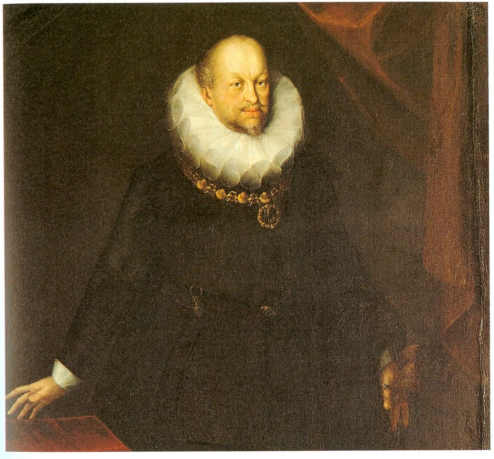 Herzog Friedrich I von Württemberg (1557-1608) Schloßverwaltung Ludwigsburg